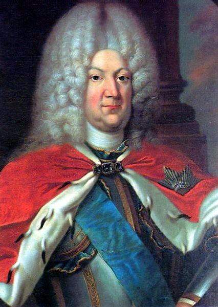 Portrait of Karl Leopold, Herzog zu Mecklenburg (1678-1747)